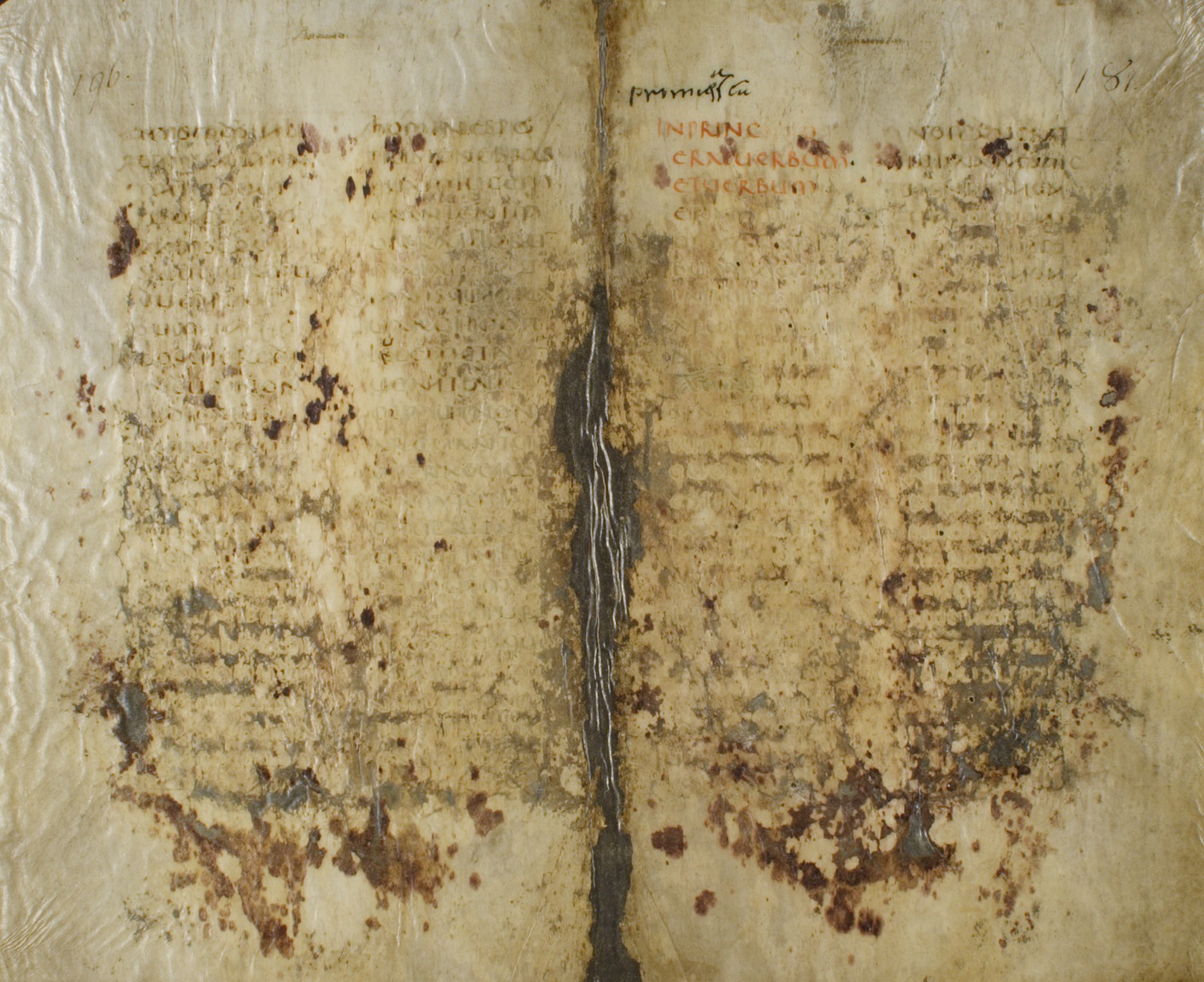 Fogli 196v e 181r del codex A; opera propria della Fondazione Museo del Tesoro del Duomo e Archivio Capitolare di Vercelli, 2013.